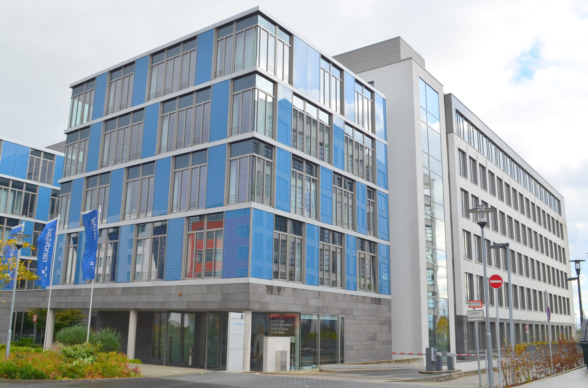 Randstad Hauptsitz in Eschborn